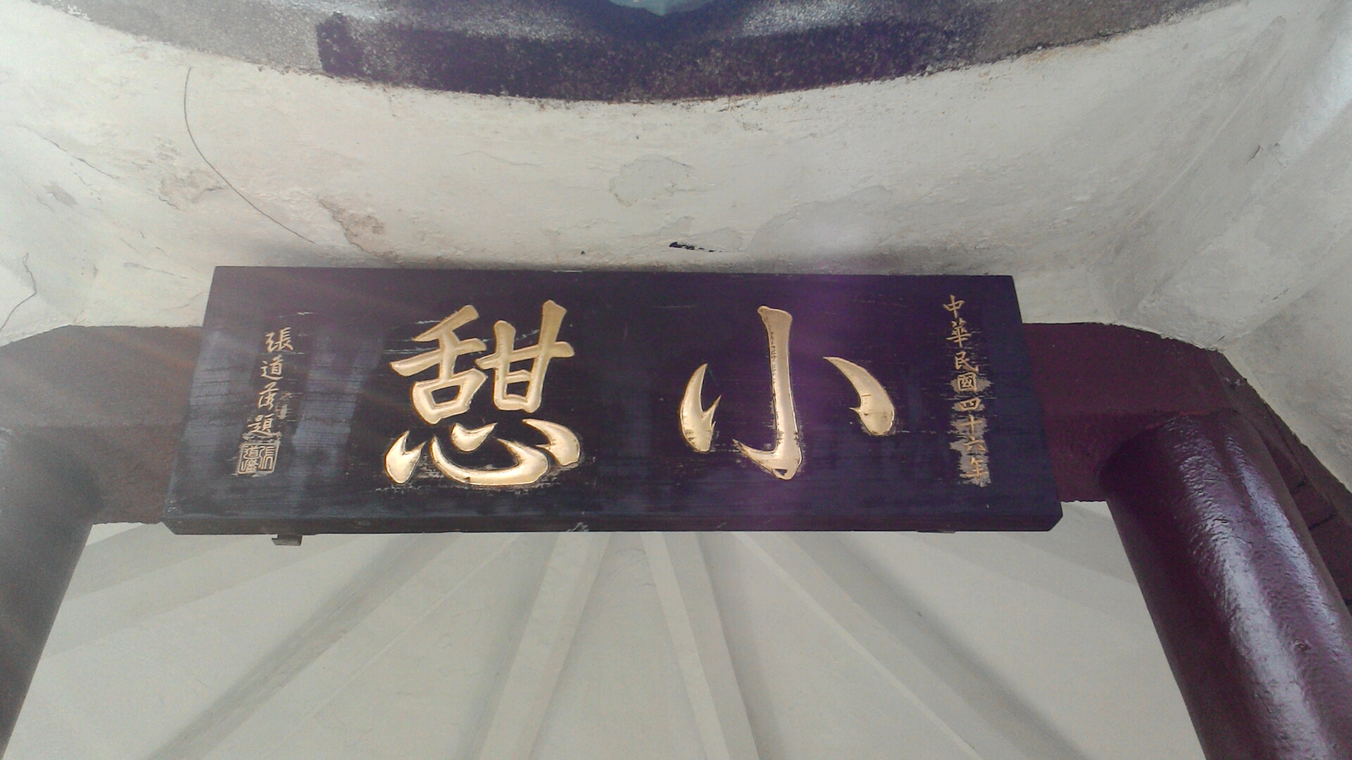 陽明公園內涼亭上張道藩所提的匾額,台北市北投區陽明山次分區湖山里,1957年